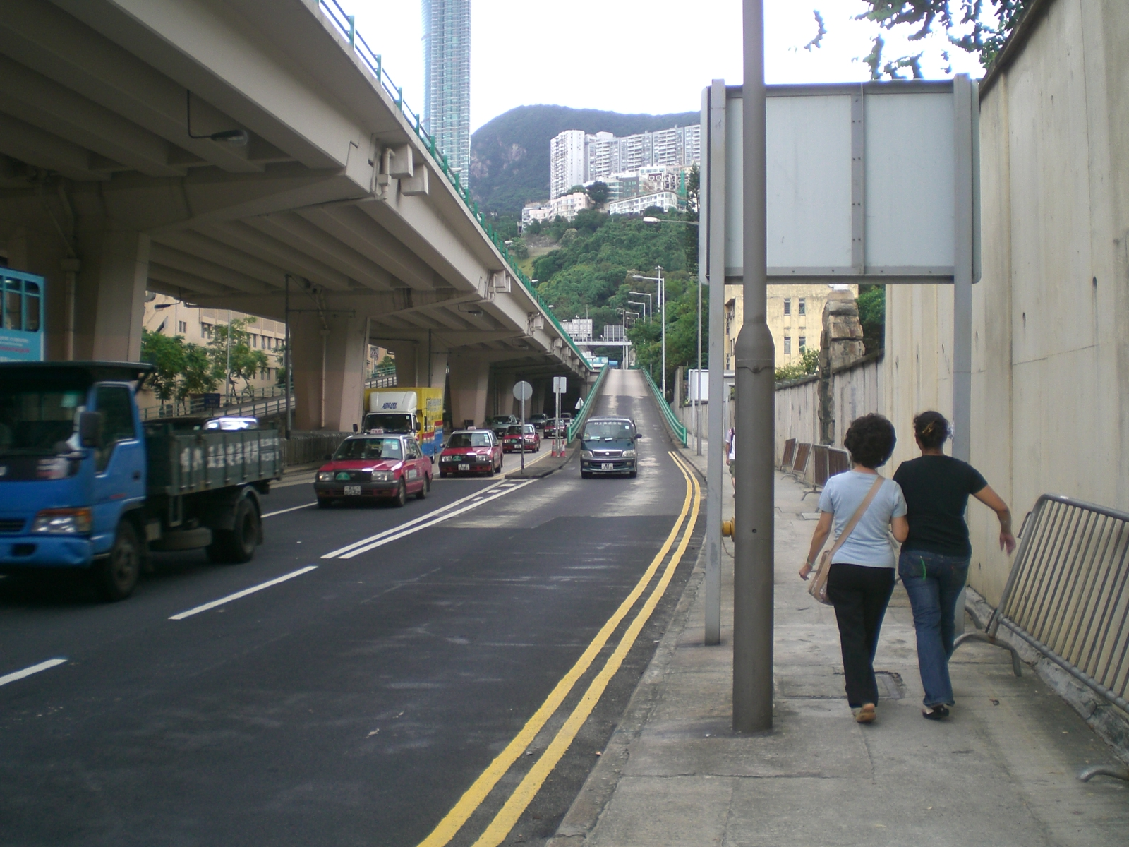 中文（香港）: 黃泥涌峽天橋, 跑馬地黃泥涌道&黃泥涌峽道